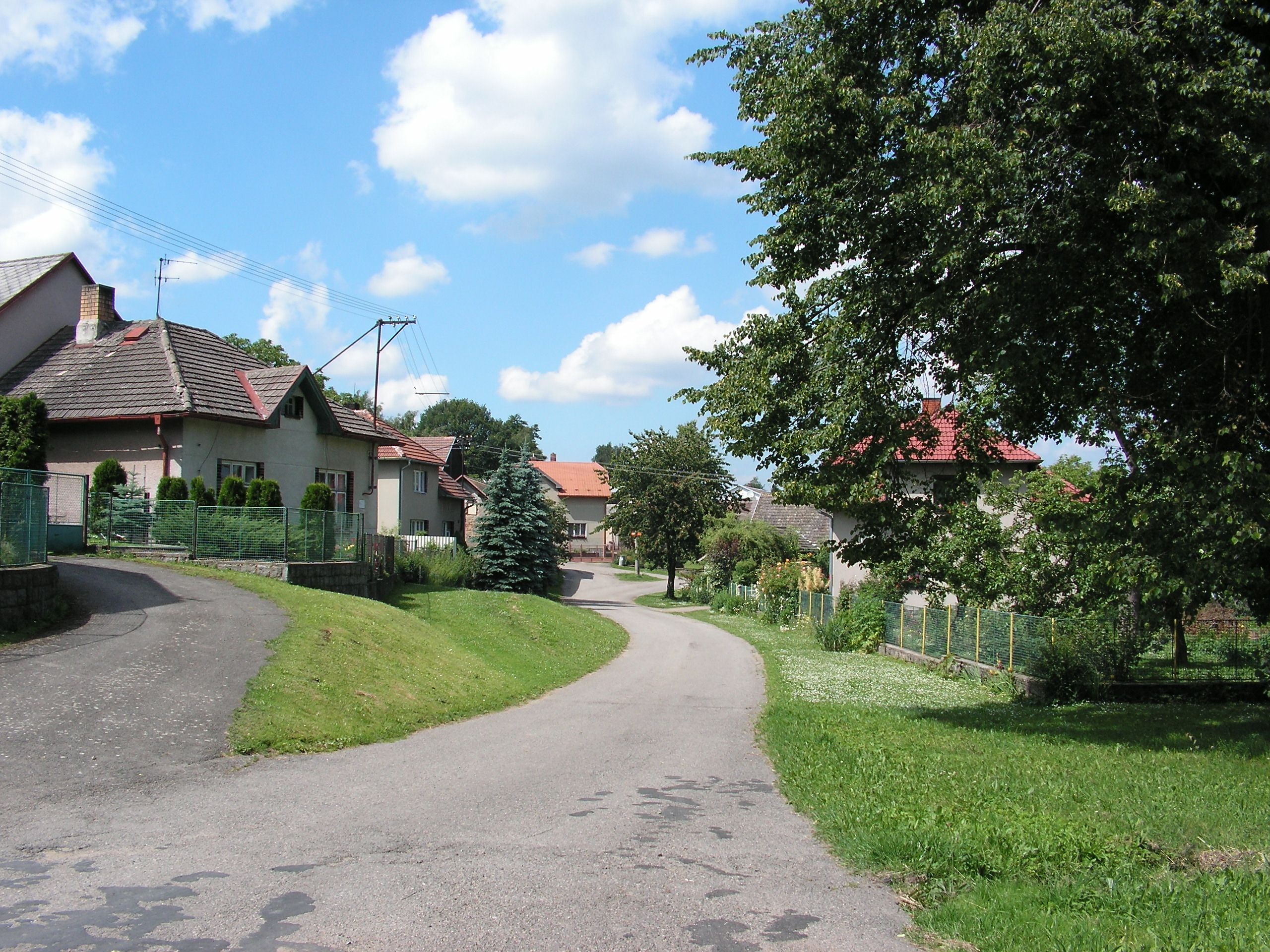 Kynice v okrese Havlíčkův Brod.